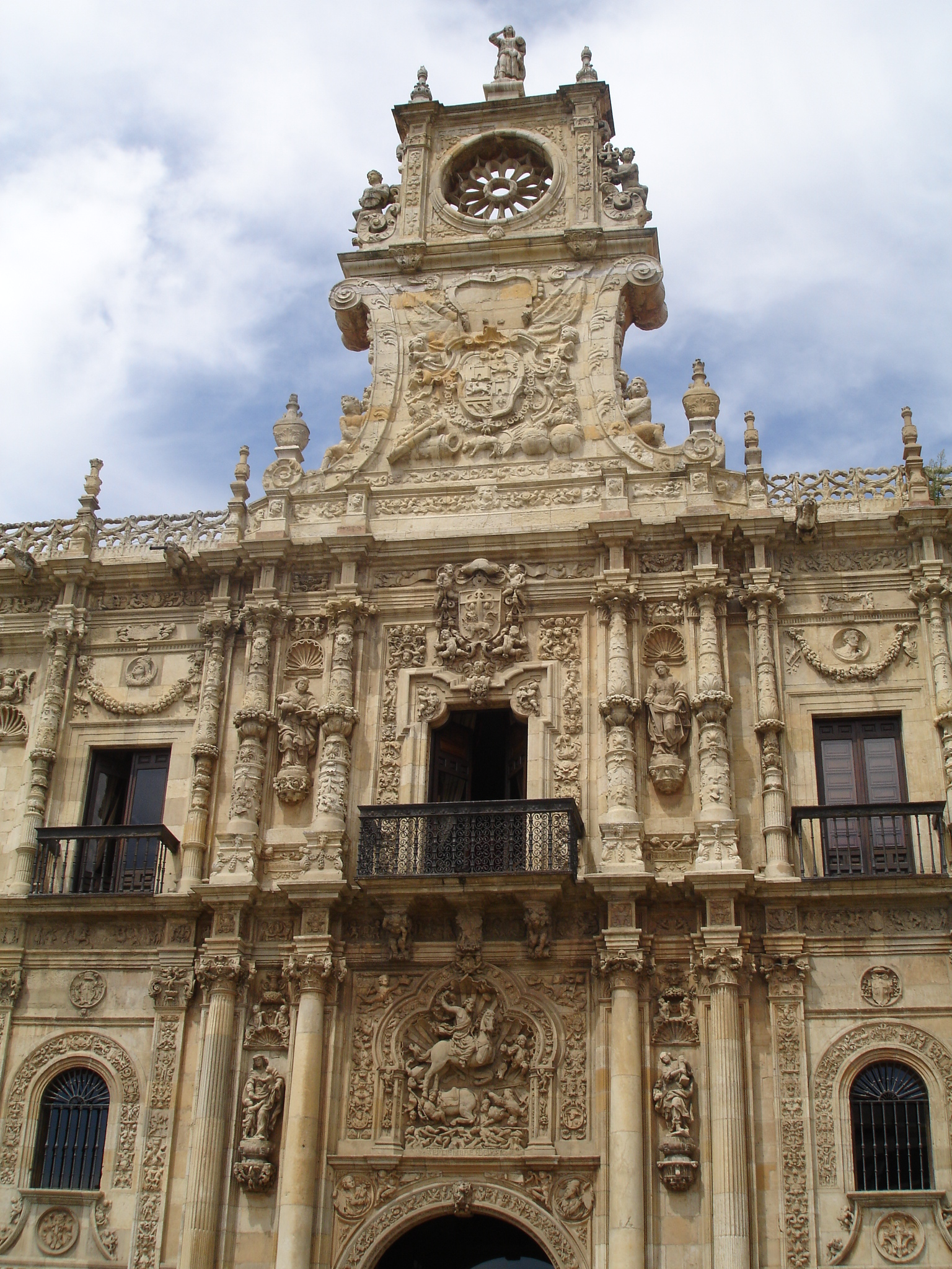 San Marcos, León